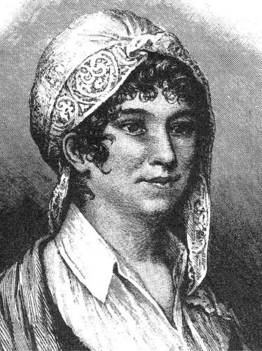 Die Schriftstellerin und Journalistin Marie Therese Huber (1764-1829)